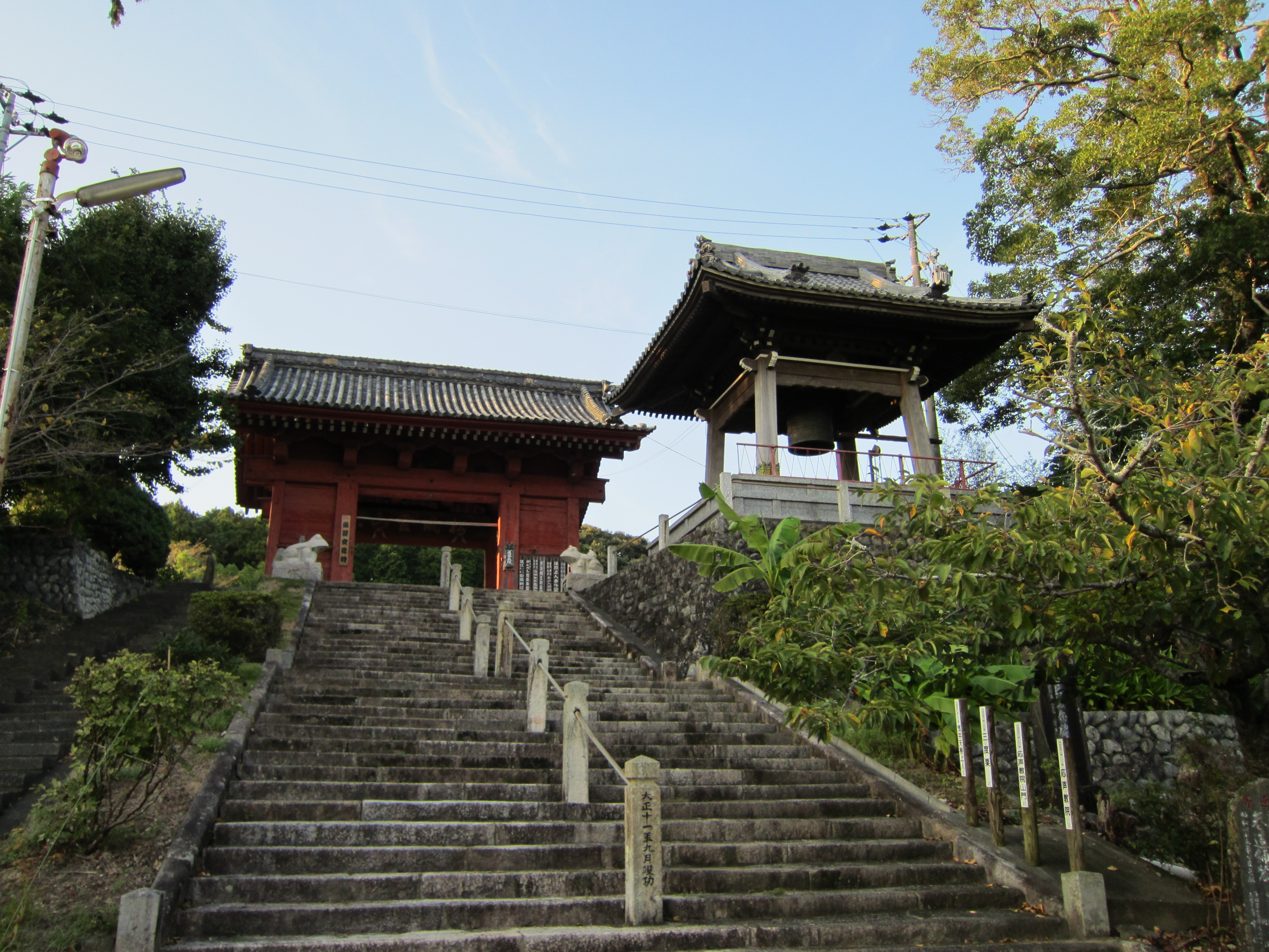 応声教院